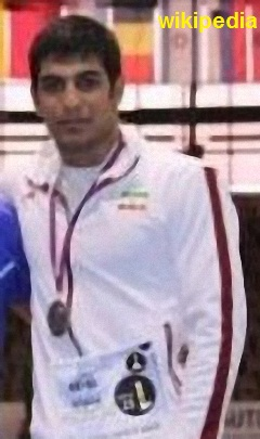 آرمان علیزاده عبدولی